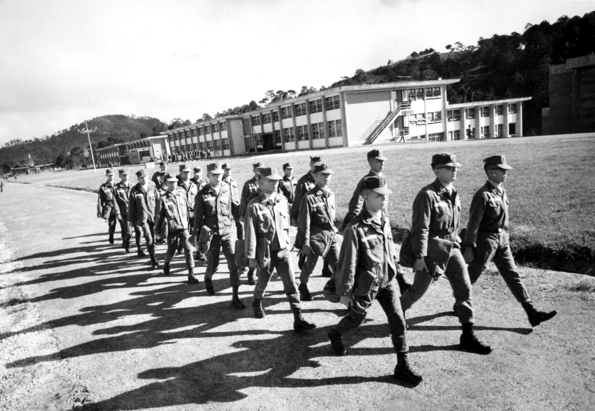 Cadets At Dalat